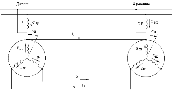 Аднафазны сельсін у індыкатарнай схеме